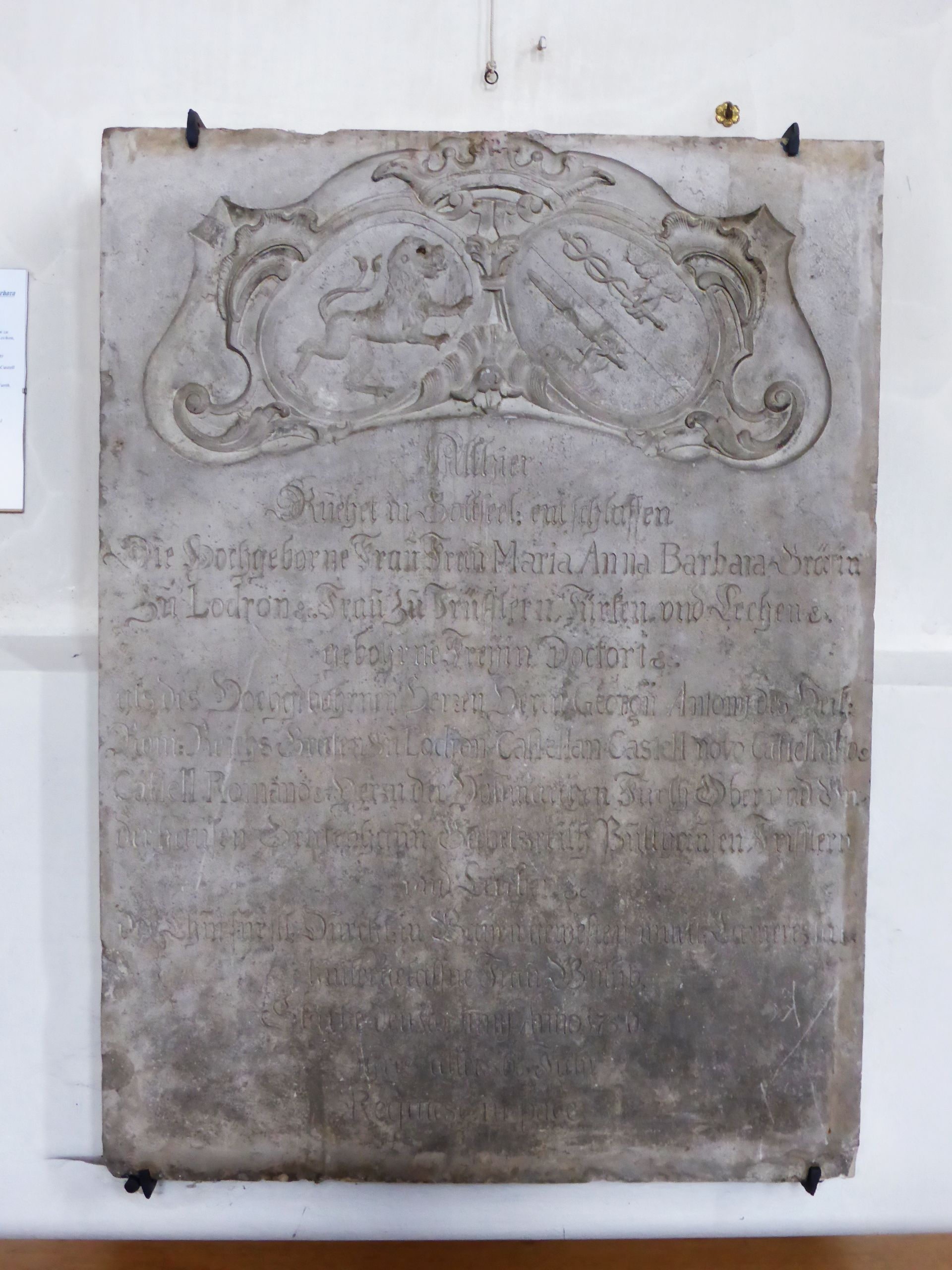 Pfarrkirche Triftern